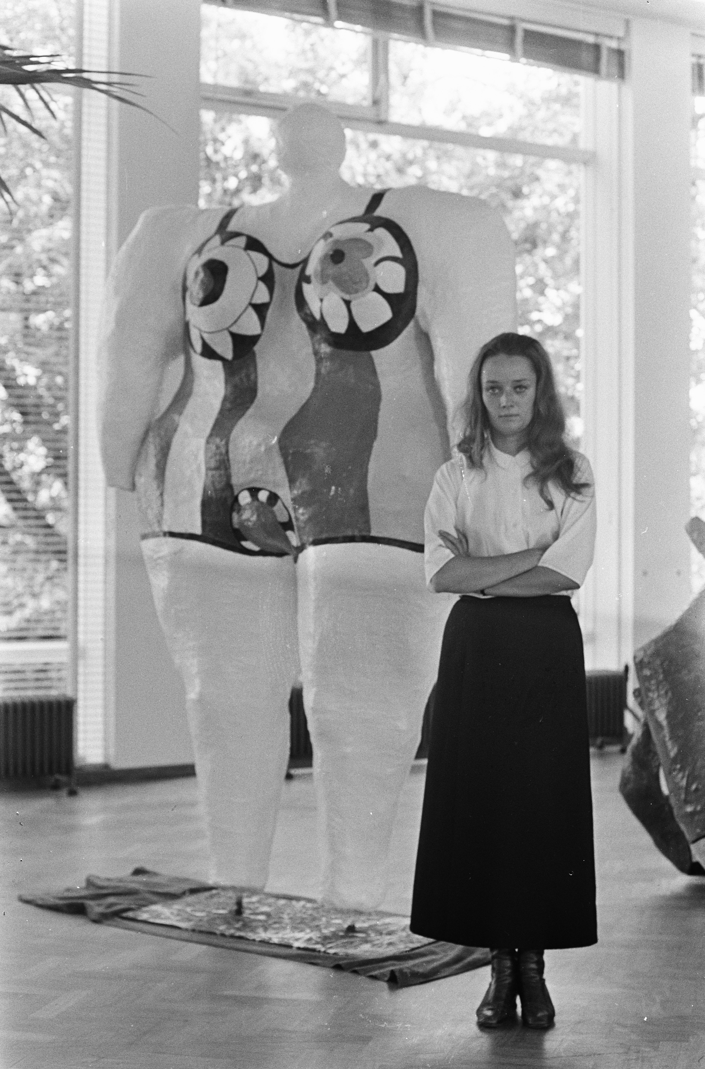 Collectie / Archief : Fotocollectie Anefo Reportage / Serie : [ onbekend ] Beschrijving : Niki de Saint Phalle in Stedelijk Museum Amsterdam. Nikki bij haar kunstwerken Datum : 23 augustus 1967 Trefwoorden : Musea, kunstwerken Persoonsnaam : Saint Phalle, Niki de Fotograaf : Nijs, Jac. de / Anefo Auteursrechthebbende : Nationaal Archief Materiaalsoort : Negatief (zwart/wit) Nummer archiefinventaris : bekijk toegang 2.24.01.05 Bestanddeelnummer : 920-6241